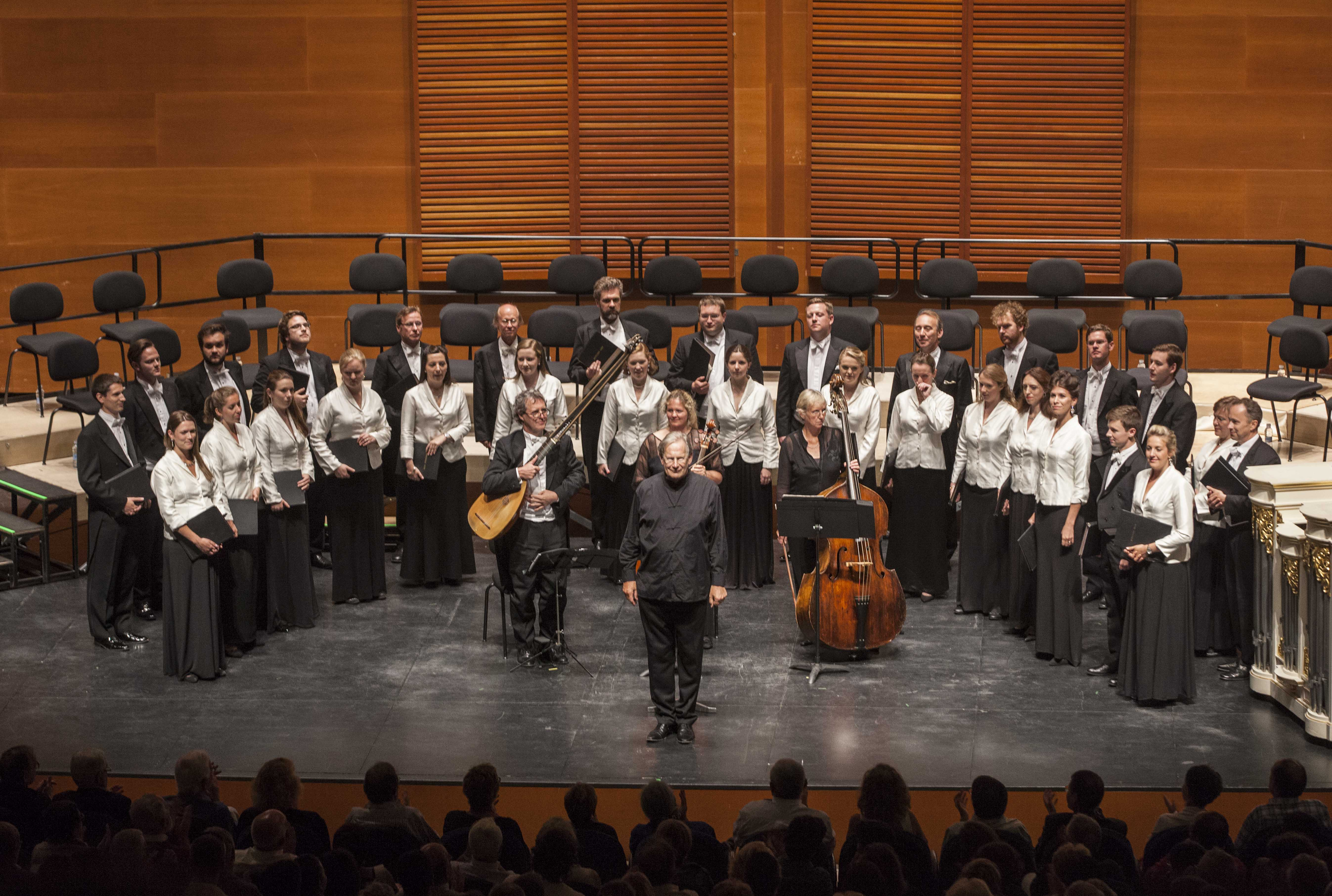 © Quincena Musical- Iñigo Ibáñez